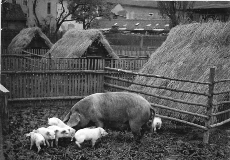 Volksgut "Gerhard Eisler" in Pommritz, Kreis Bautzen geht neue Wege in der Schweinezucht. Der Betriebsleiter des Volksgutes, Georg Fischer, ein früherer Landarbeiter, fand sich nicht damit ab, dass die Sterblichkeit bei den Ferkeln 40 % und mehr betrug. Seit Januar 1950 führte er Versuche nach den Lehren Mitschurins durch, um die Schweine und Ferkel gesündere Lebensbedingungen zu schaffen und leistungsfähigere, abgehärtete Tiere zu züchten. Er richtete Schweinehütten aus Holzstangen und Strohdächern in Kleingehegen ein, in denen die Muttersauen einige Wochen vor dem Ferkeln untergebracht werden. Muttertiere und Ferkel halten sich im Sommer wie im Winter (auch bei 20 Grad Kälte) in den Hütten und im Freien auf. -Nach dieser Neueinführung schwand die Sterblichkeit bei den Ferkeln in kurzer Zeit gänzlich. Auch entwickeln die Ferkel durch den Aufenthalt im Freien eine derartige Freßlust, dass sie nicht mehr die früher notwendigen 12 Monate, sondern nur noch 8-9 Monate bis zur Schlachtreife (140-150 Kilogramm) benötigen. UBz, Muttersau mit Ferkeln im Freigehege. Aufn., Illus-Mammsch Gr-We. 26.5.1951